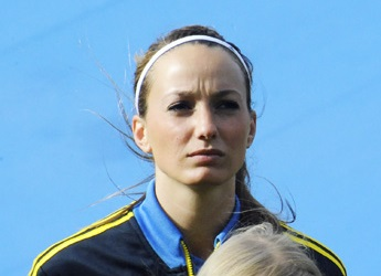 Kosovare Asllani